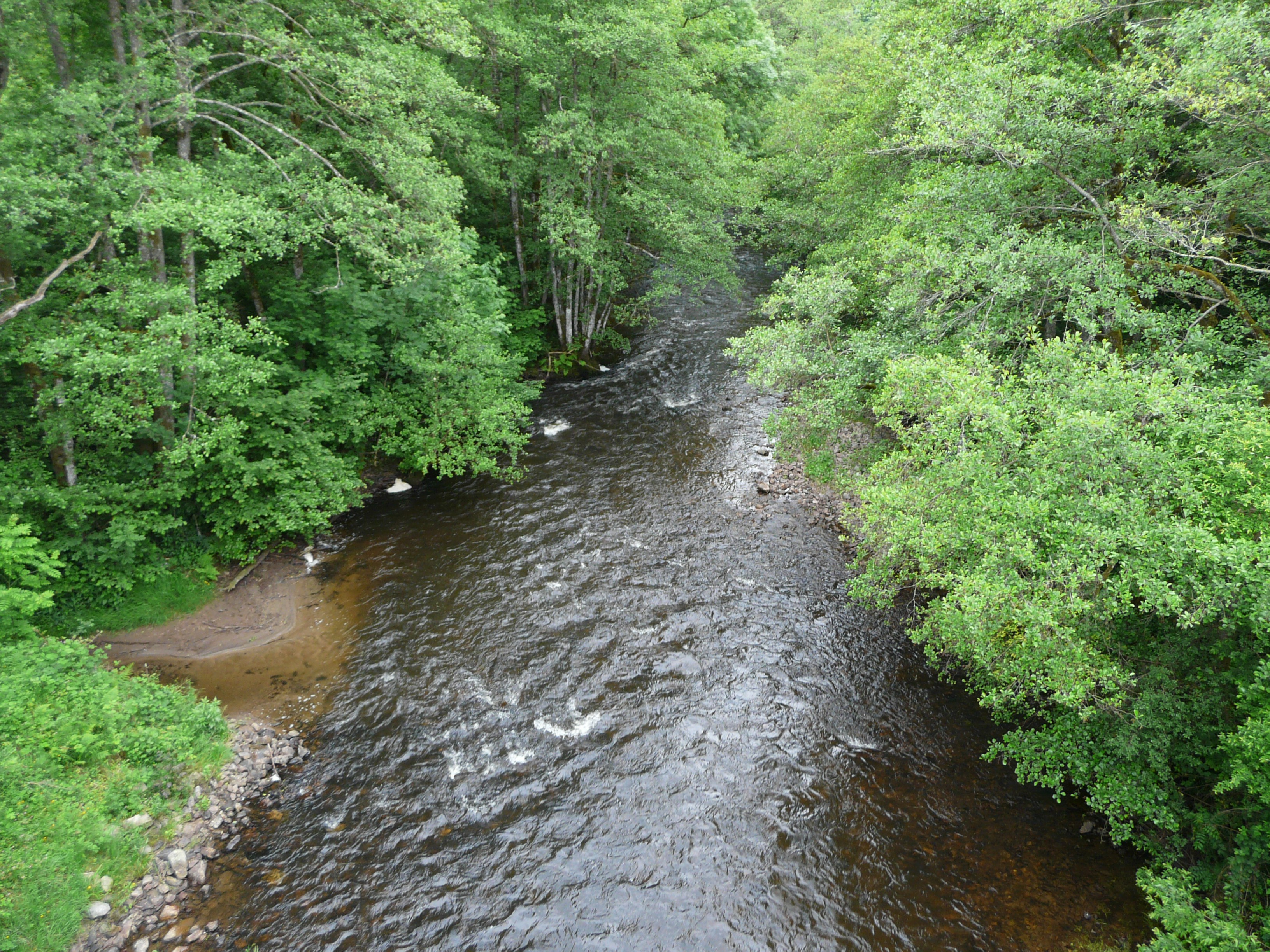 En aval du pont de la route départementale 2089, le Chavanon marque la limite entre les communes de Bourg-Lastic (Puy-de-Dôme, Auvergne, à gauche) et Feyt (Corrèze, Limousin, à droite).